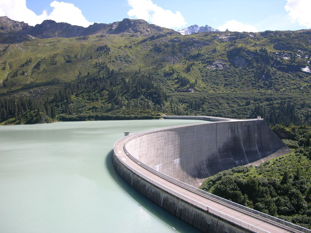 Kops Stausee in Österreich